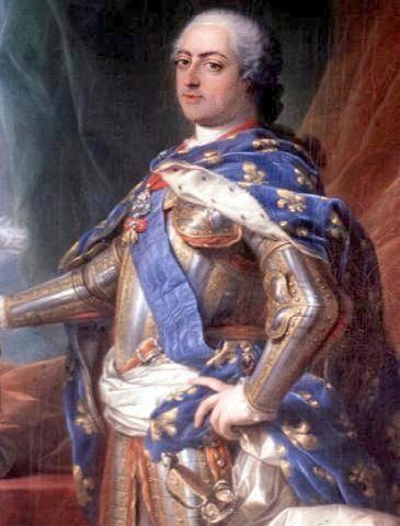 Louis XV in Armour